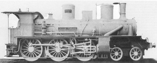 Autore: Anonimo Fonte: Descrizione: Locomotiva RM 3101, poi FS 656 Data: Prima del 1905 Licenza